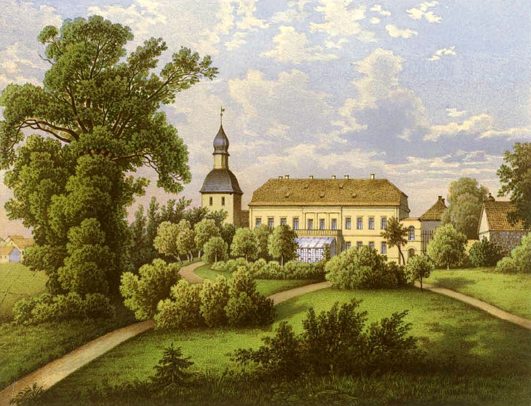 Rittergut Pammin, Kreis Arnswalde, Provinz Brandenburg